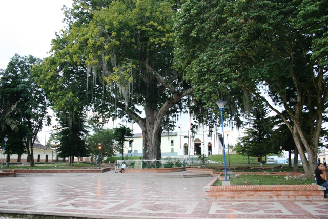 Parque principal del Municipio de Saladoblanco